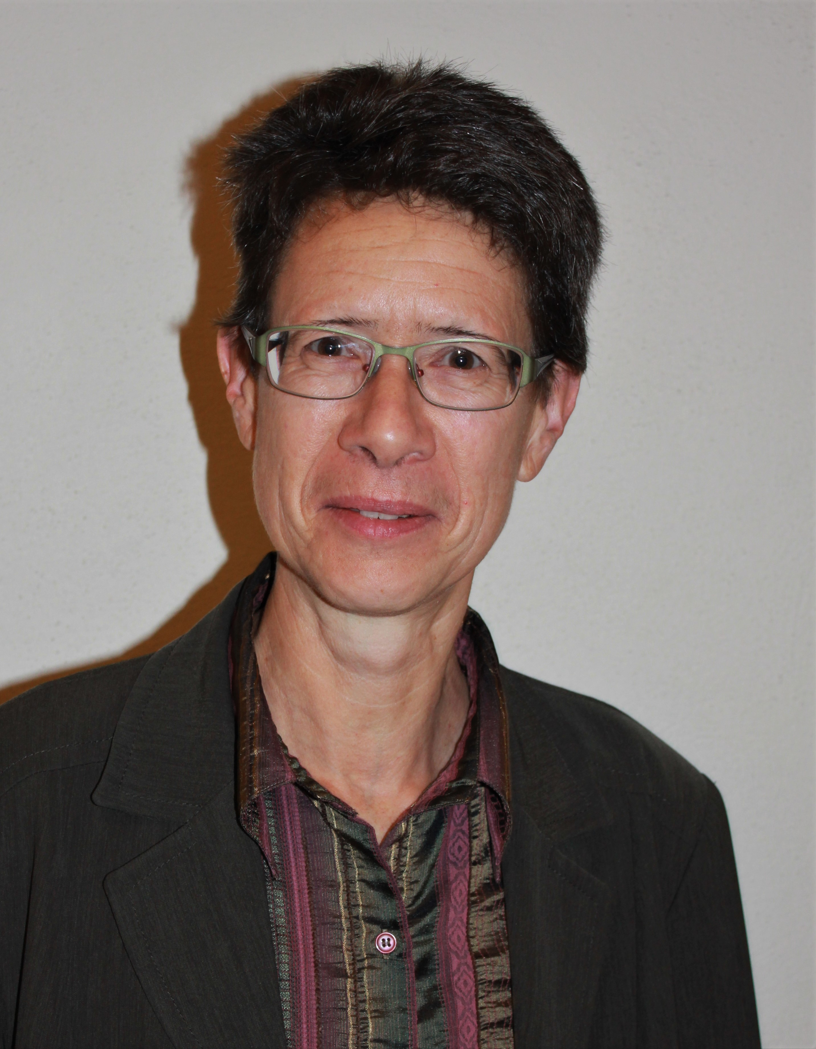 Eva-Maria Faber ist eine deutsche römisch-katholische Theologin und Hochschullehrerin für Dogmatik und Fundamentaltheologie an der Theologischen Hochschule Chur (Schweiz).